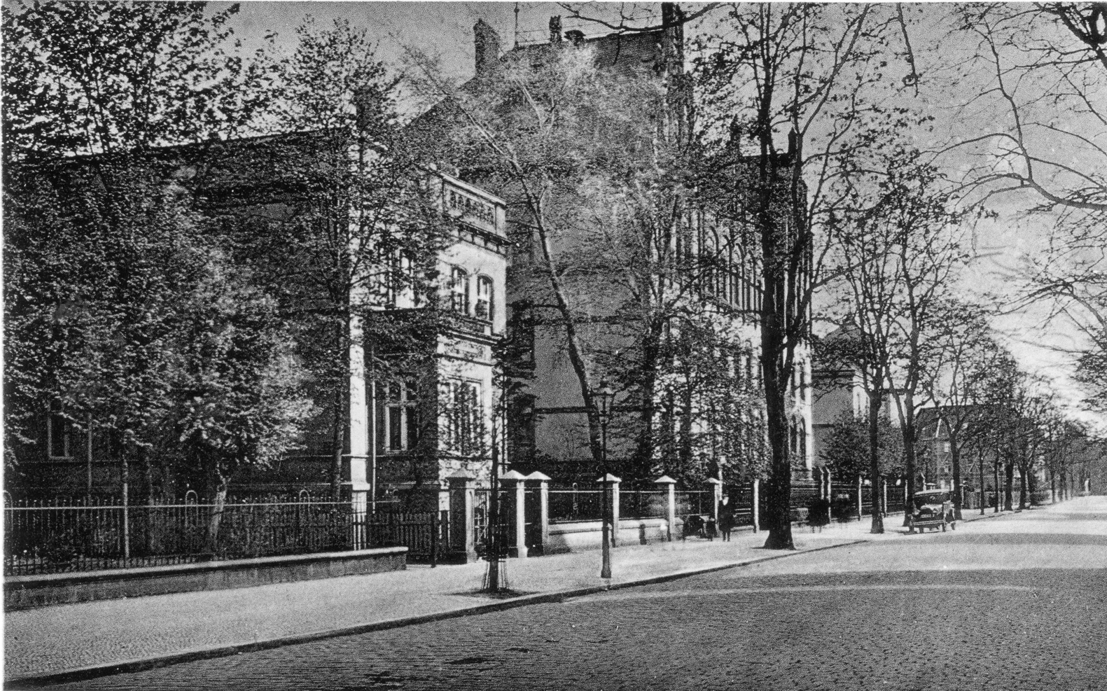 Landesfrauenklinik und Provinzialhebammenlehranstalt Magdeburg